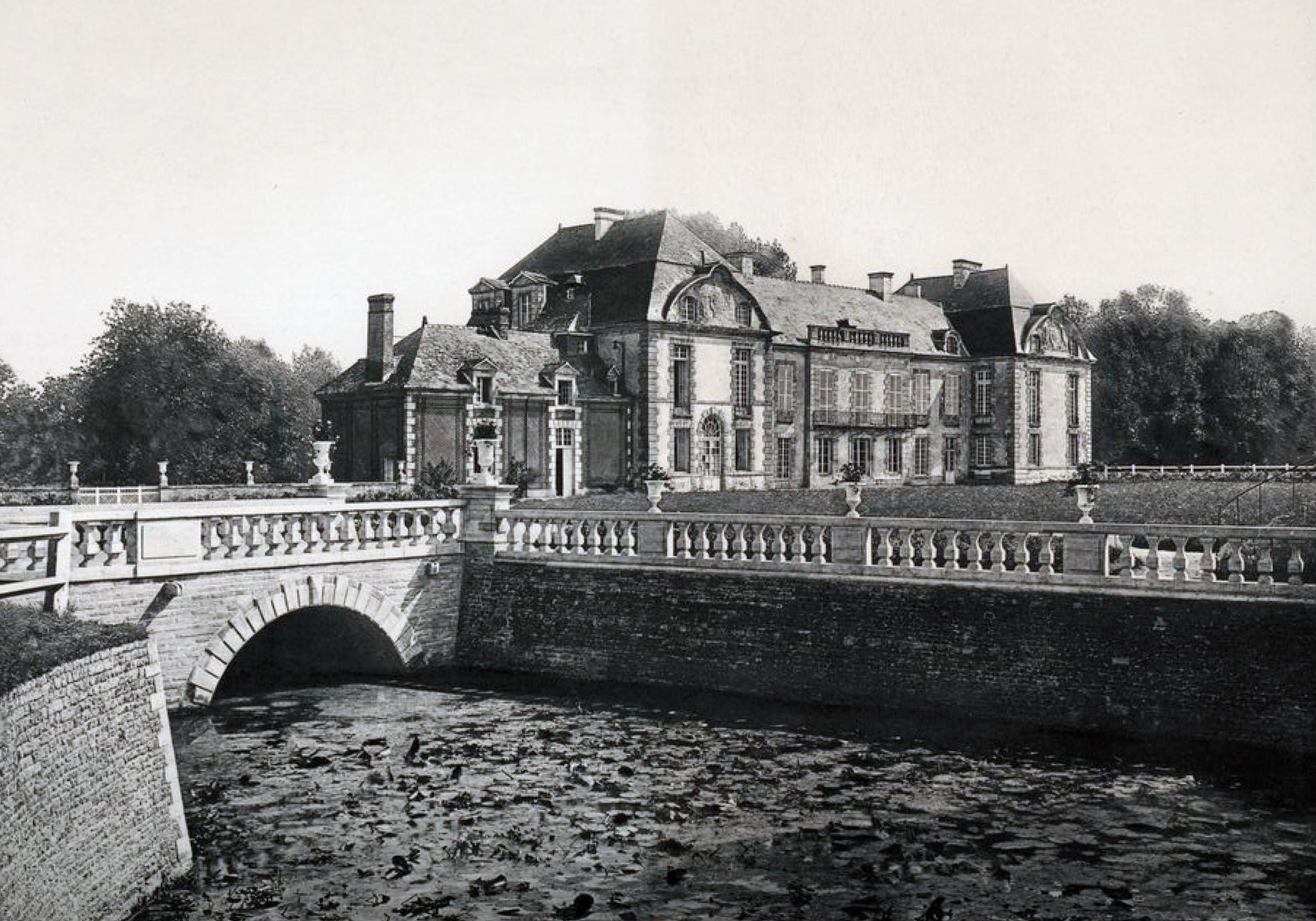 Schloss Médavy, Département Orne, Frankreich